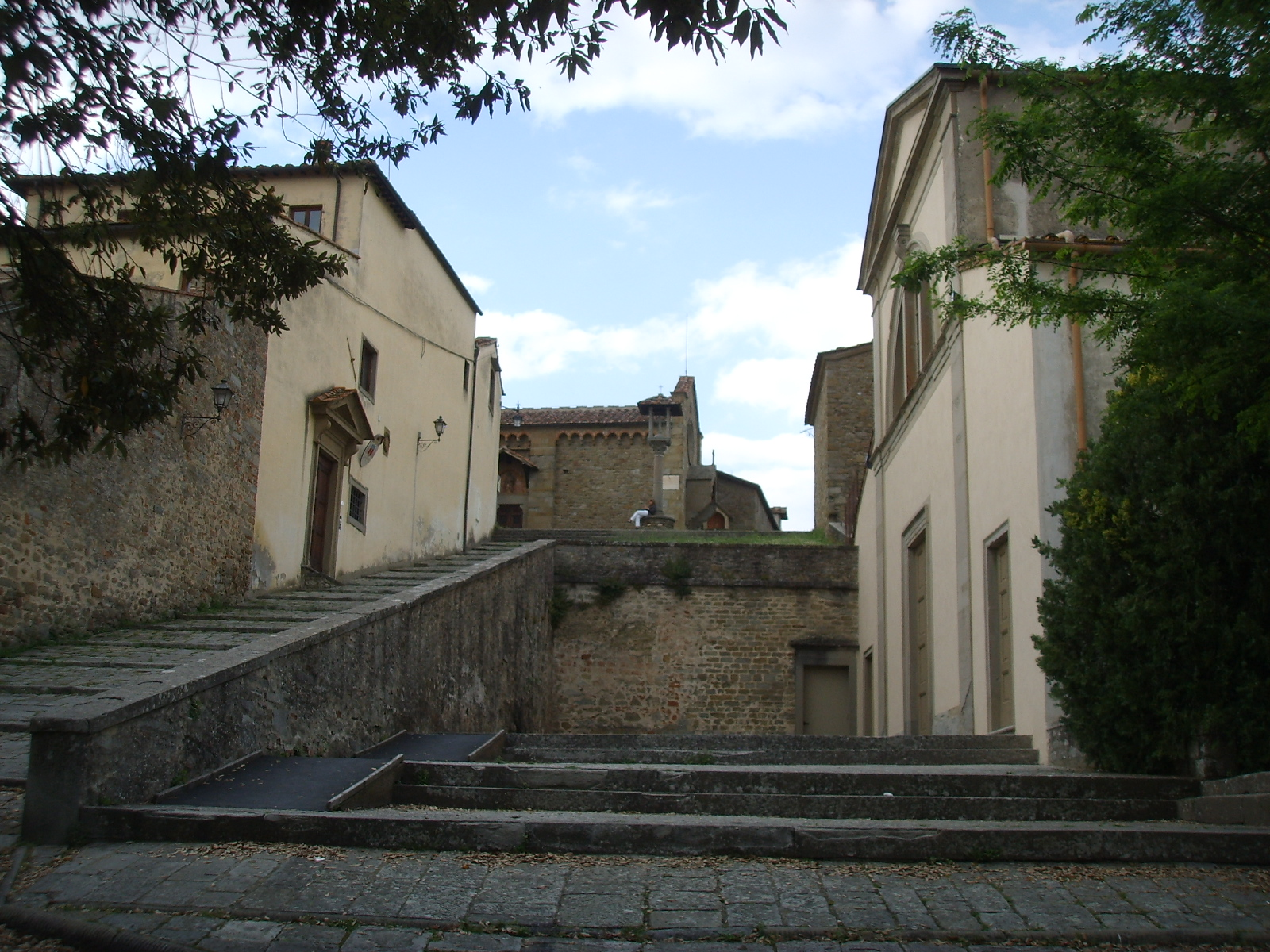 Via di san francesco, salita